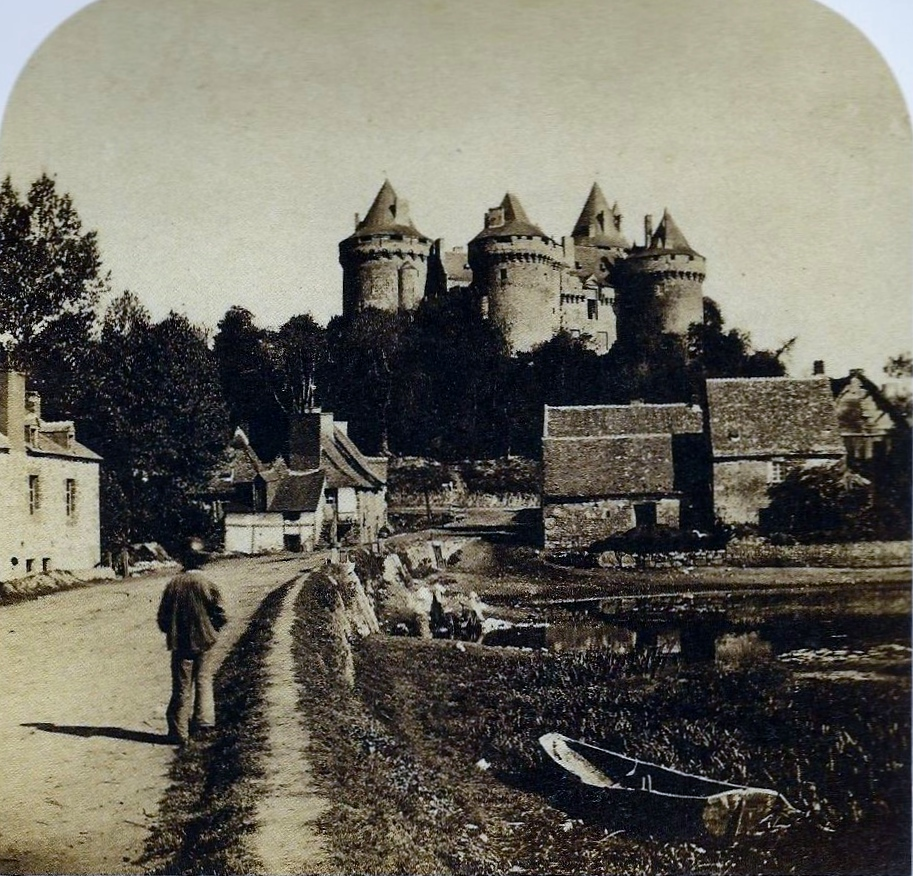 Le château de Chateaubriand à Combourg en 1859 (photographie de John Jephson, Augustus Reeves, Henry Taylor, 1859, vue stéréoscopique positive, papier albuminé)